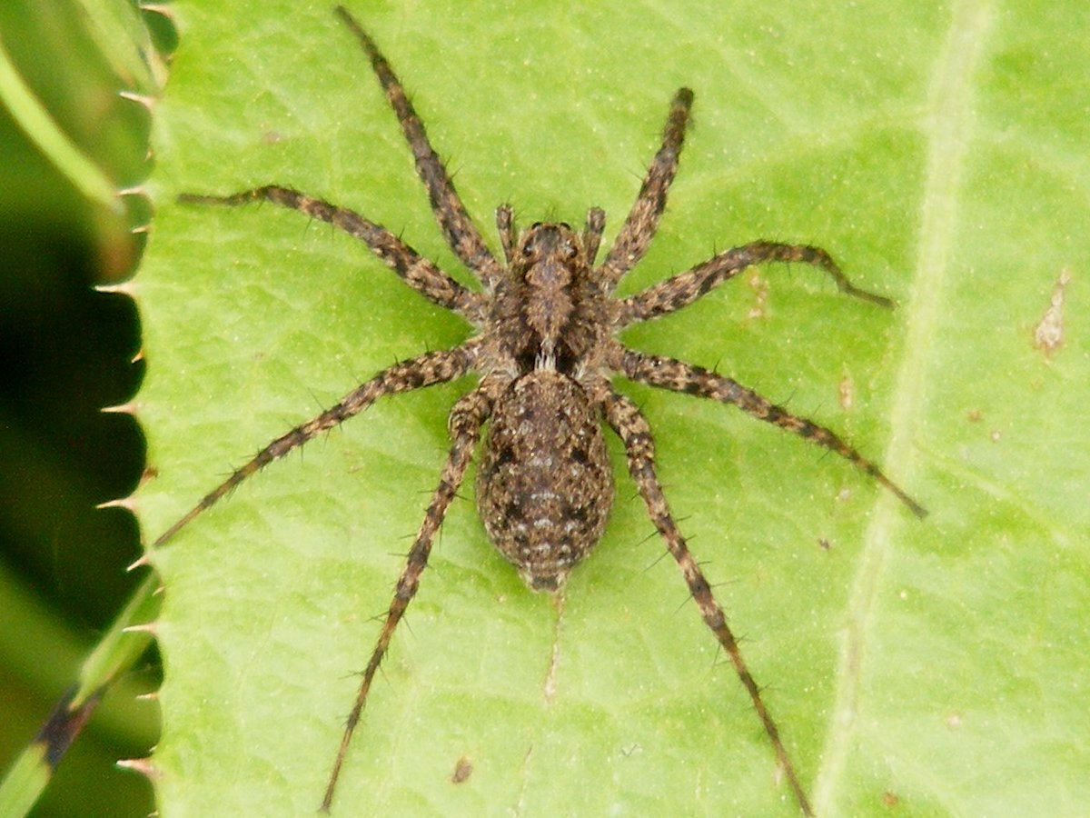 Pardosa milvina : Photographié dans la région montréalaise les 20 et 22 juin 2011, sur Fujifilm FinePix S700.